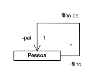 Exemplo de associação unária em UML. Autor: Jorge Roberto Diniz Martins